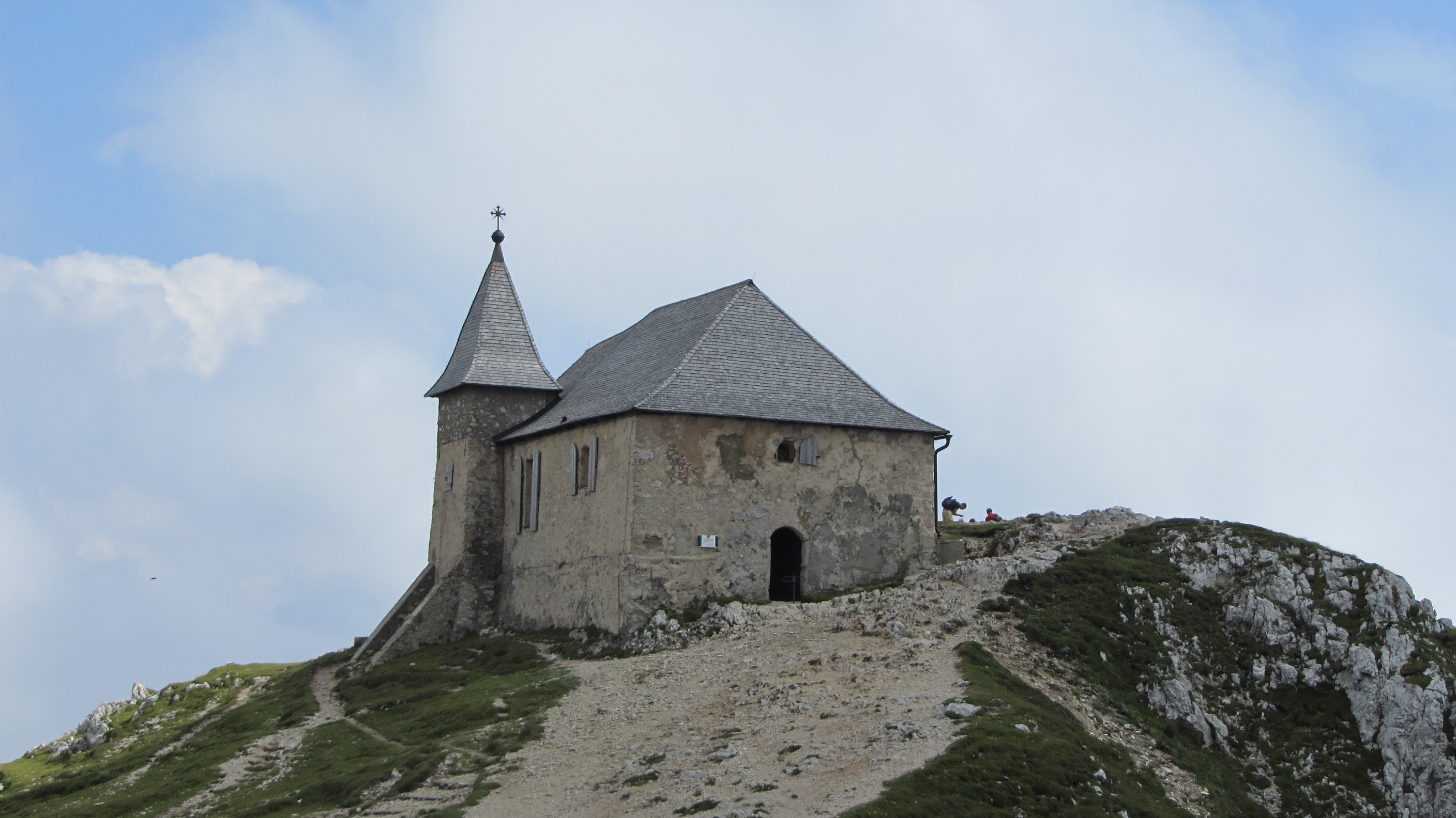 Eingang der Kapelle in aus Nord-West-Richtung fotografiert